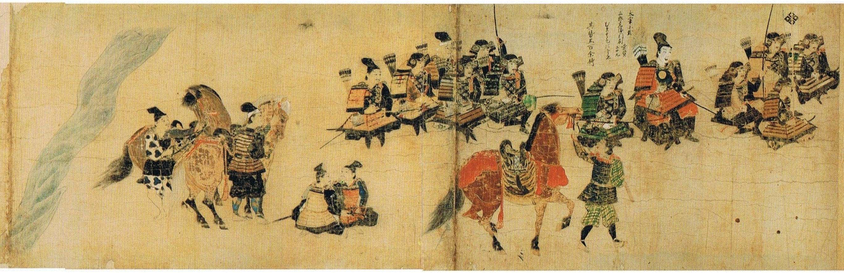 『蒙古襲来絵詞』前巻、絵二